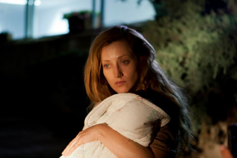 הילה וידור